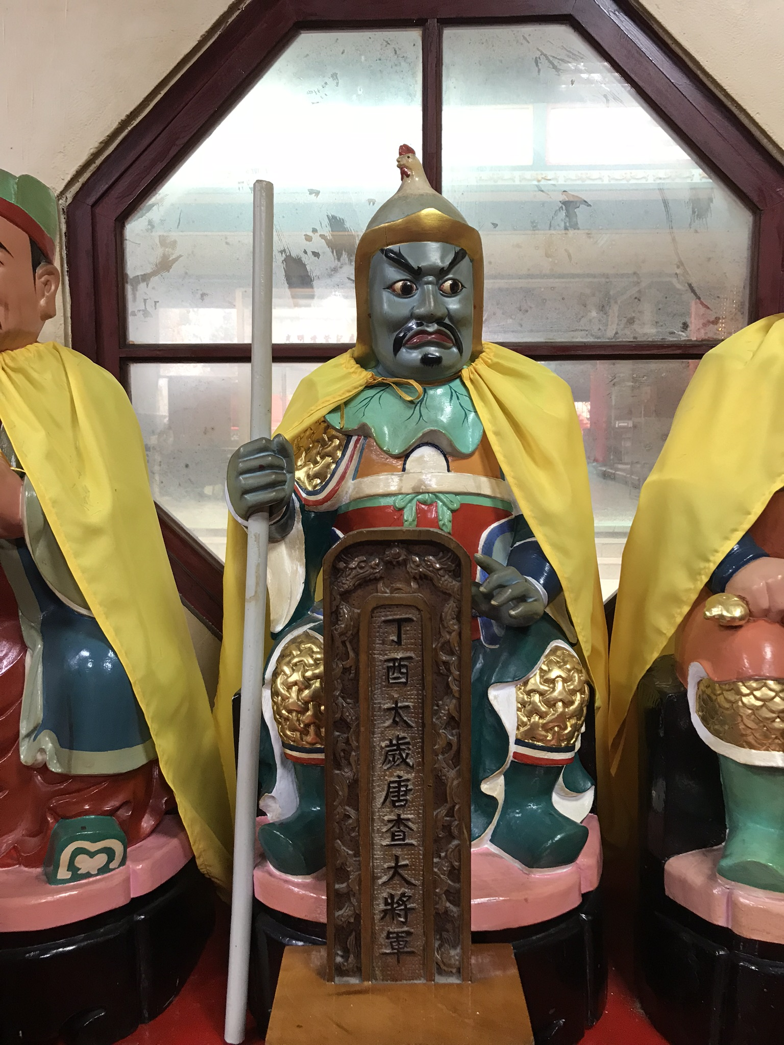 丁酉太歲唐傑大將軍神像